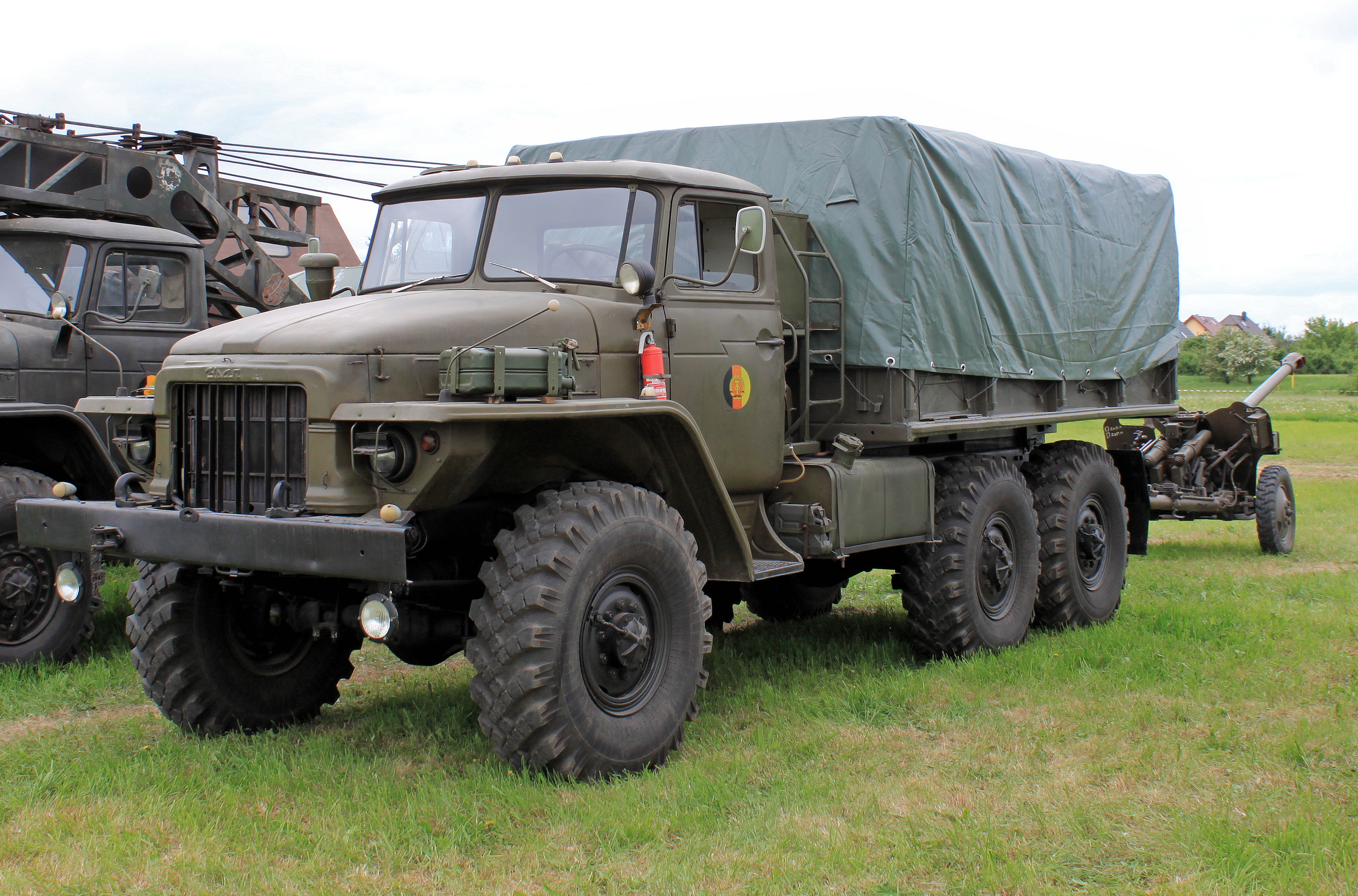 Ural 375D mit 85-mm-Divisionskanone D-44